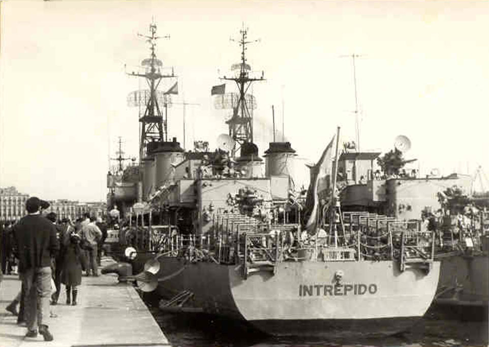 La fragata rápida Intrépido en el puerto de A Coruña, España, en 1966.